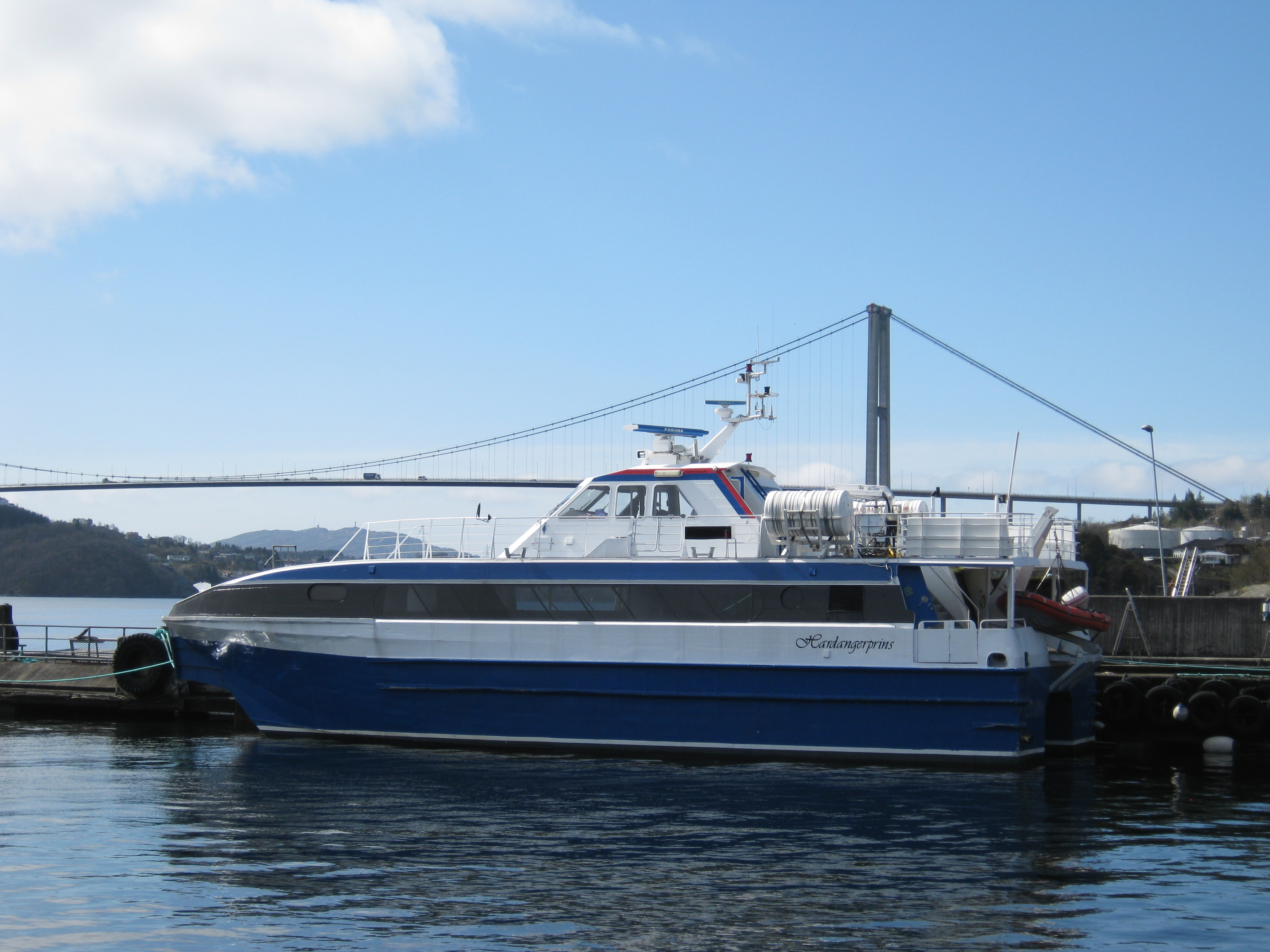 Hurtigbåten Hardangerprins ved kai i Kleppestø, Askøy